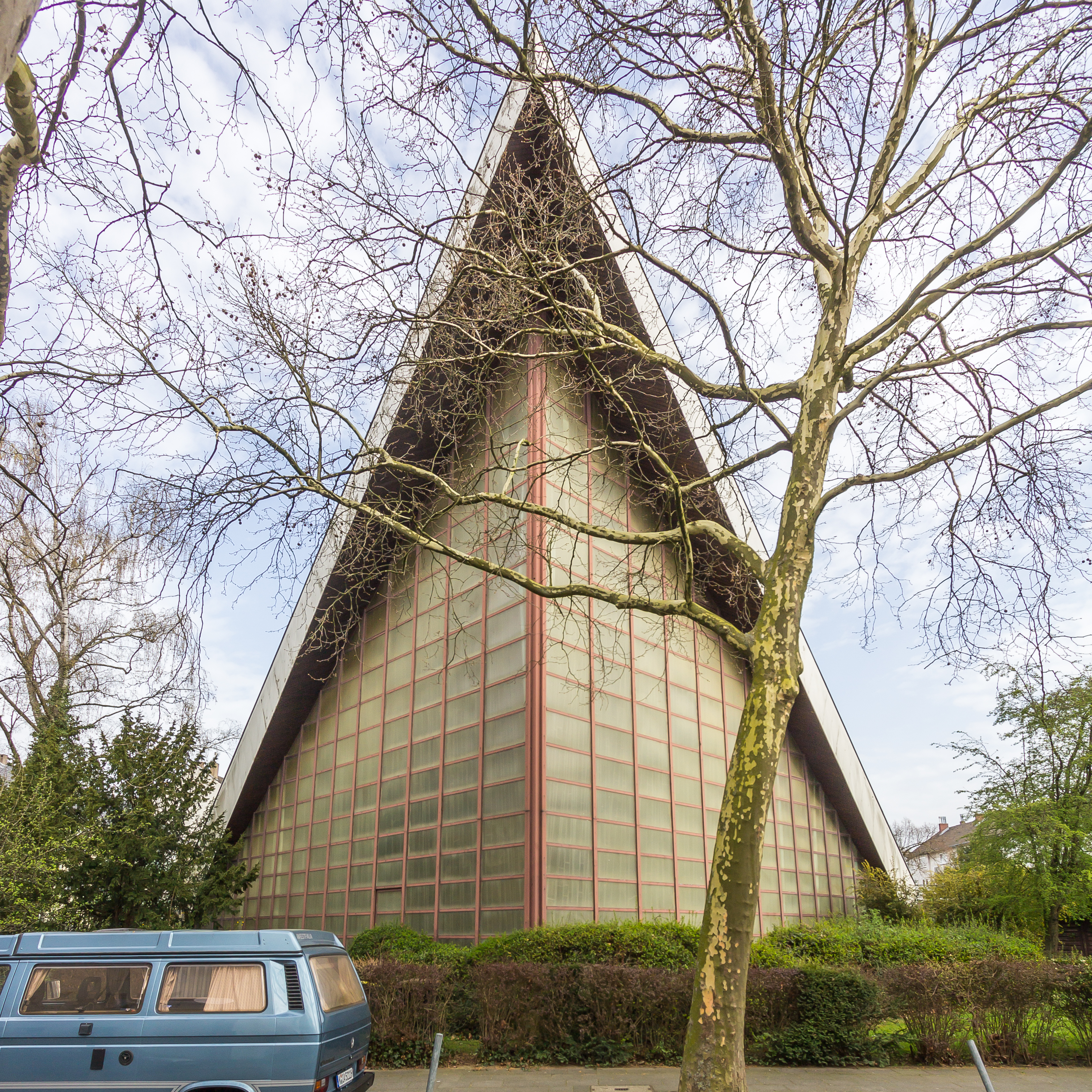 Stephanuskirche, Köln-Riehl